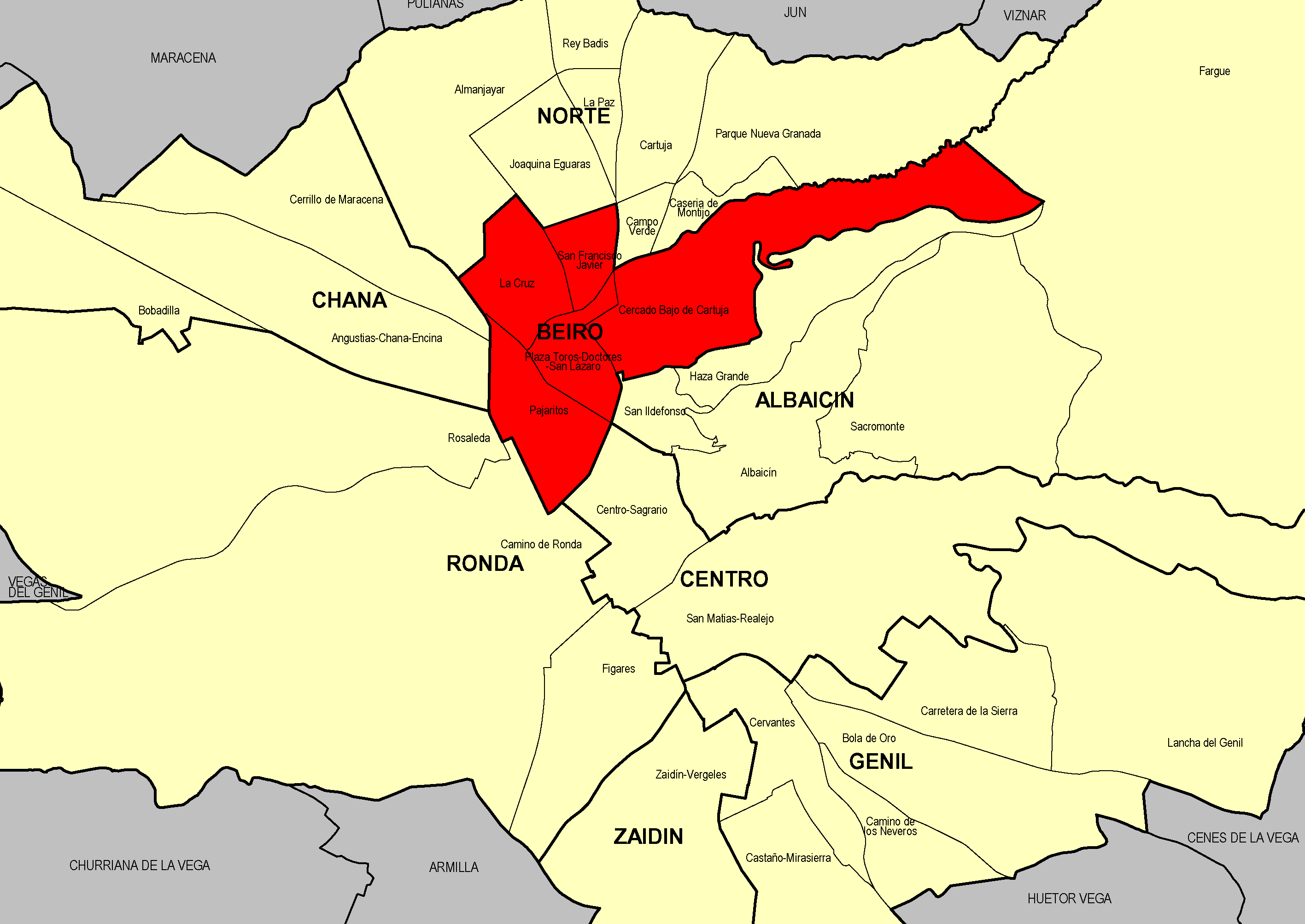 Distrito Beiro, en el municipio de Granada (Granada, España)